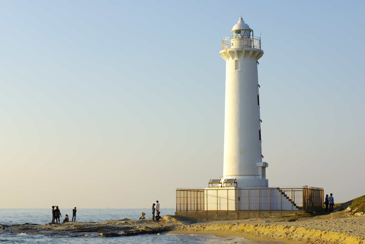 愛知県知多半島野間埼灯台夕景